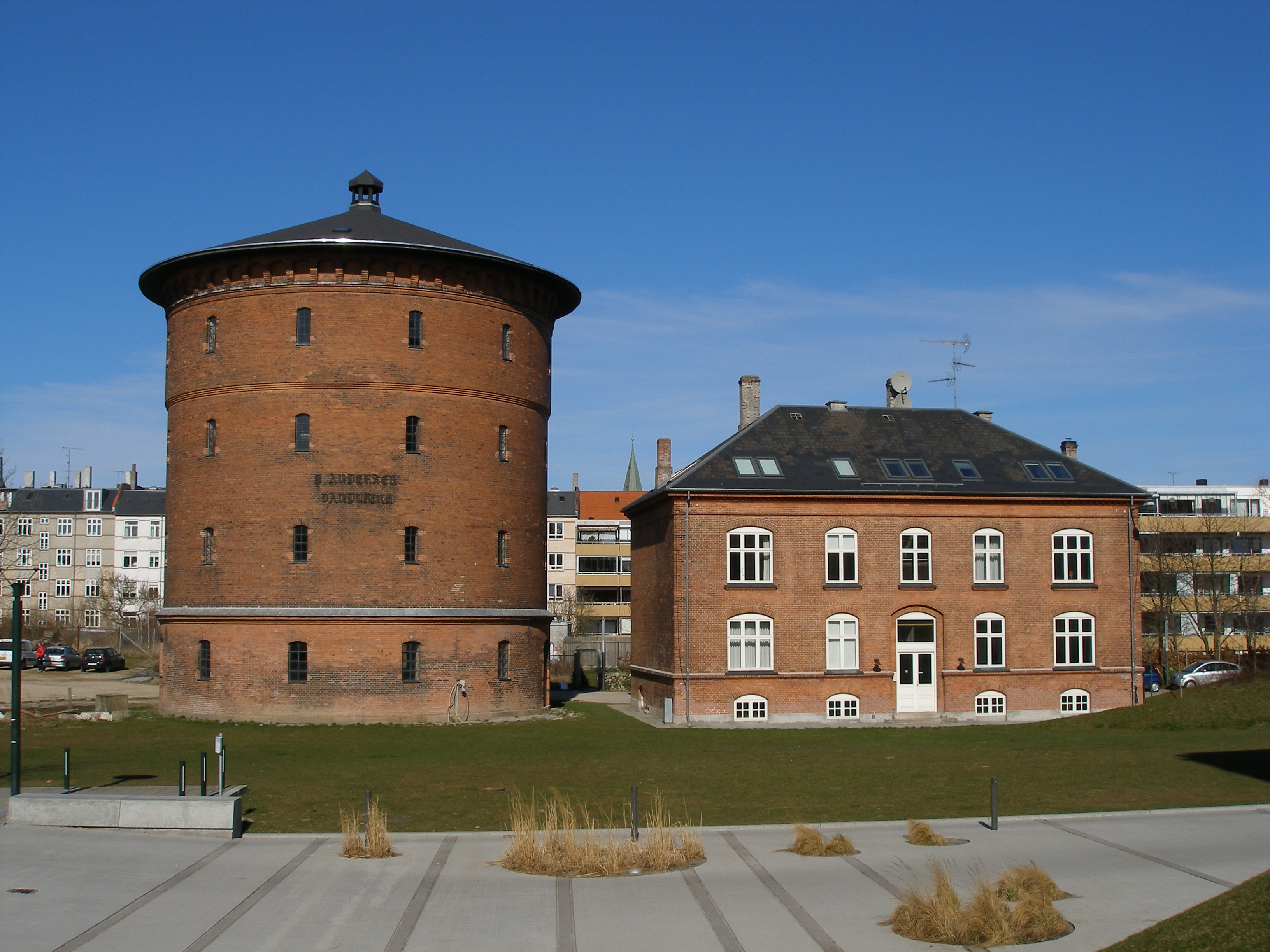 Water tower P. Andersens Vandtårn, P. Andersens Vej, Frederiksberg